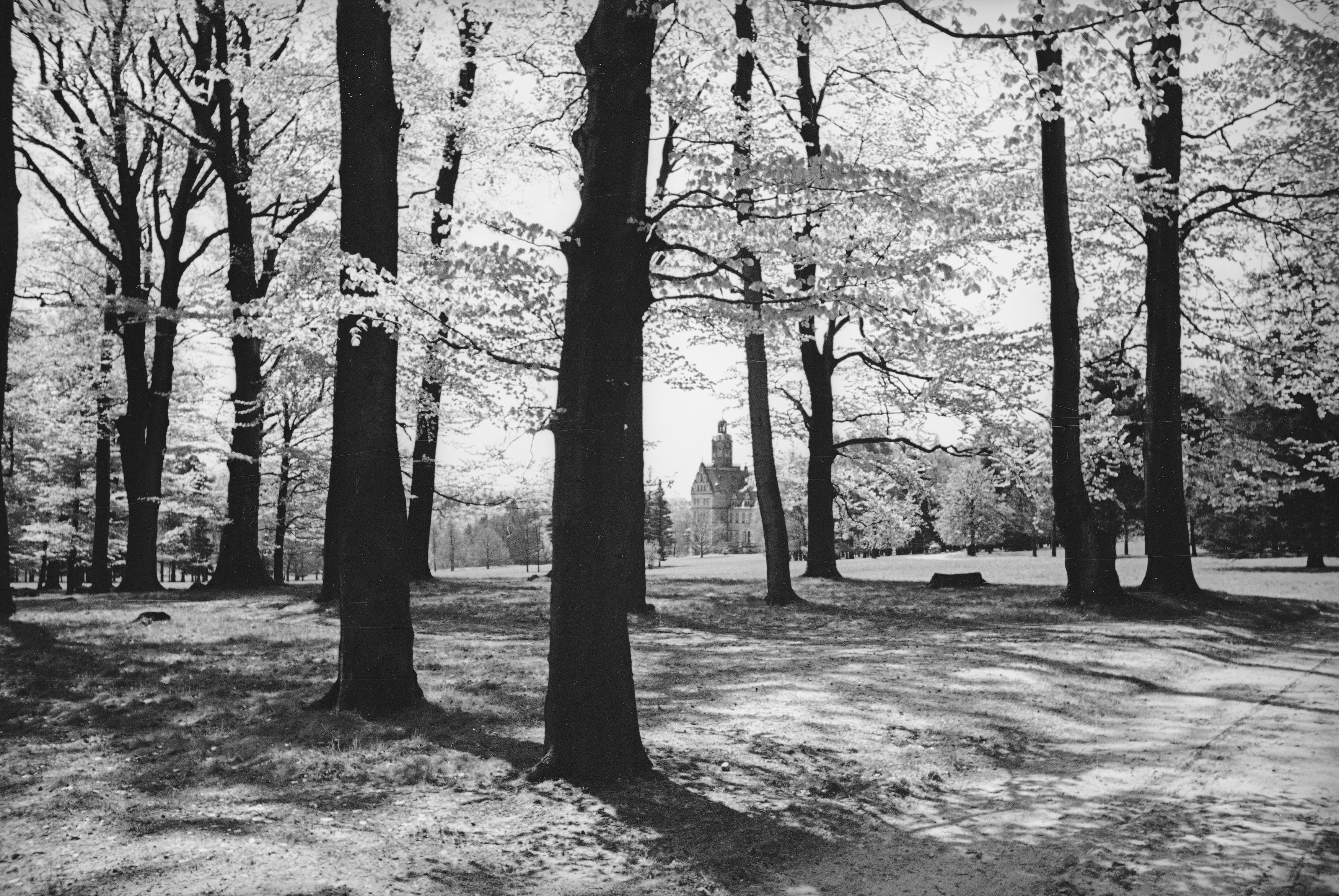 Pałac w Reptach (sygnatura NAC 3/131/0/-/158/23)